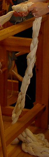 Varpfläta inför pådragning